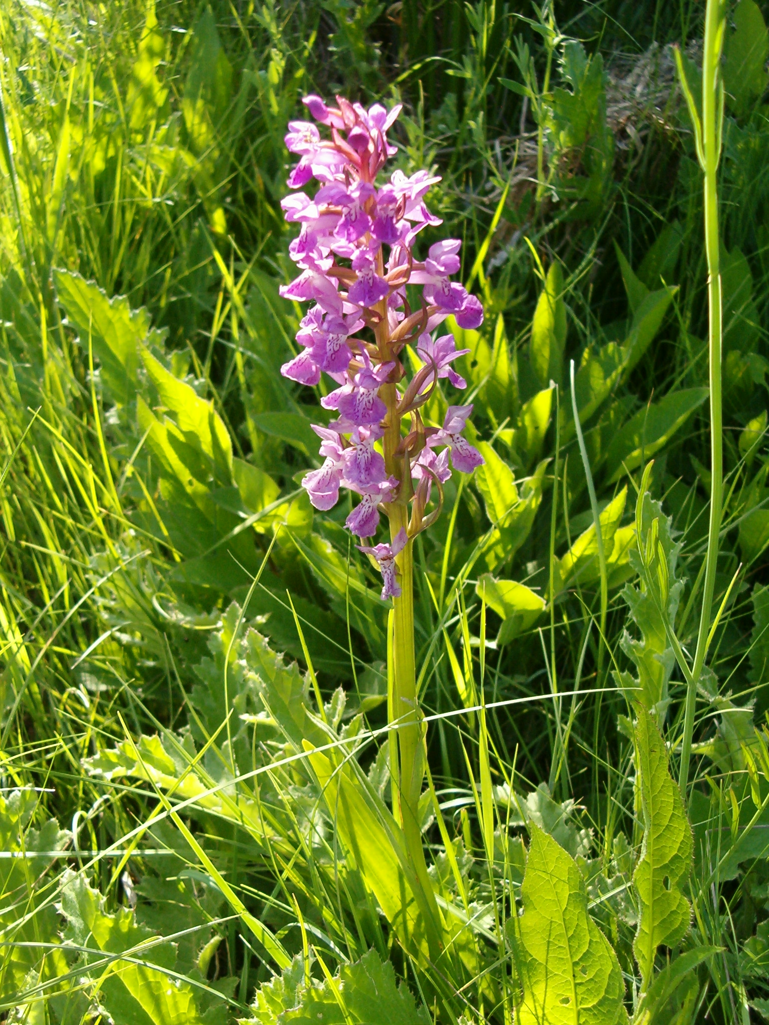 Dactylorhiza occitanica 29/5/2004 Saint-Martin-de-Londres - Herault - France Prairie humide David Delon